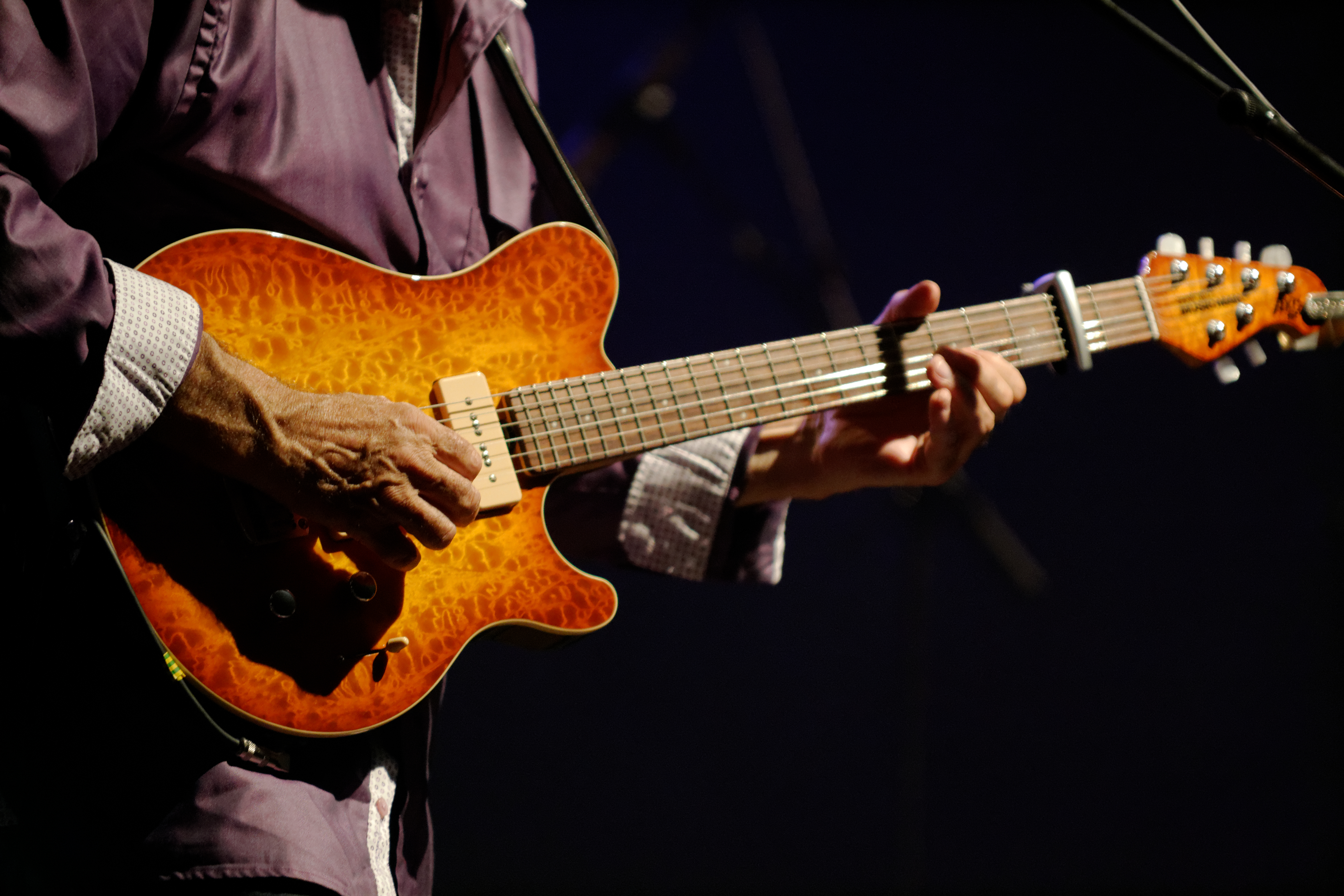 Dan Ar Braz et le bagad Kemper en concert à l'espace Gradlon lors du festival de Cornouaille 2013, à l’occasion des 90 ans du Cornouaille et des 20 ans de la création de l’Héritage des Celtes.